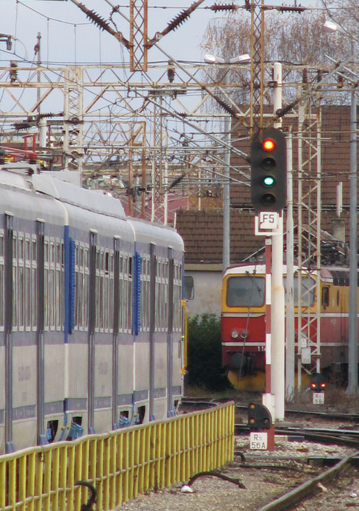 Željeznički signal na zagrebačkom Glavnom kolodvoru - prolazaka prigradskog vlaka HŽ serije 6111 - signal je zeleno+treperavo naračasto